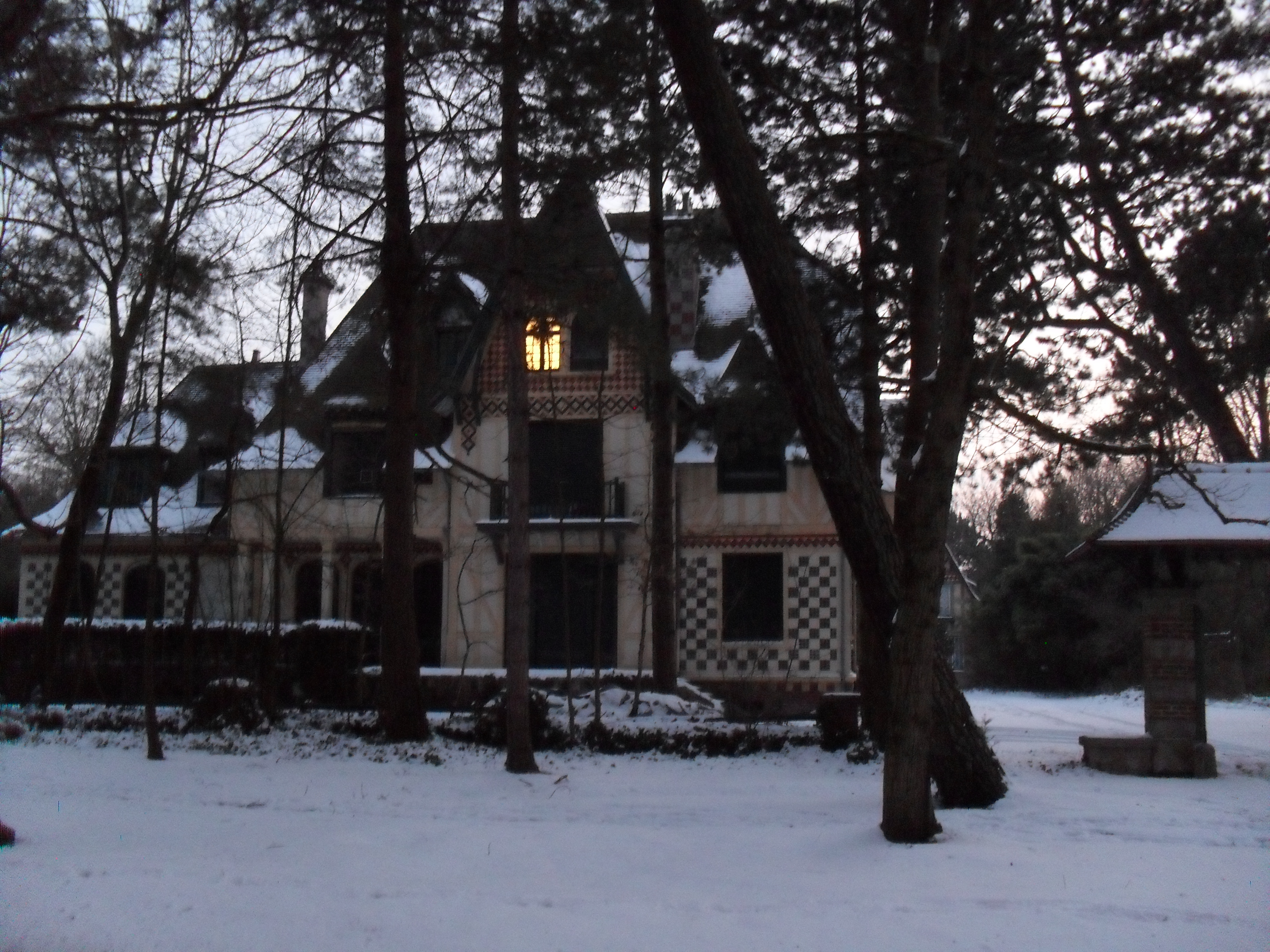 Villa Nirvana - Le Touquet-Paris-Plage Date : 1910 Architecte : Albert Pouthier La Villa a été aggrandie dès 1925 (partie à gauche de la photo) "Sont inscrites les façades et les toitures. Cette villa présente du point de vue de l'histoire et de l'histoire de l'art, un intérêt suffisant pour en rendre désirable la préservation en raison de l'originalité de cette villa située à l'orée de la forêt, copiée d'un modèle normand." (Description provenant du site de la commune)